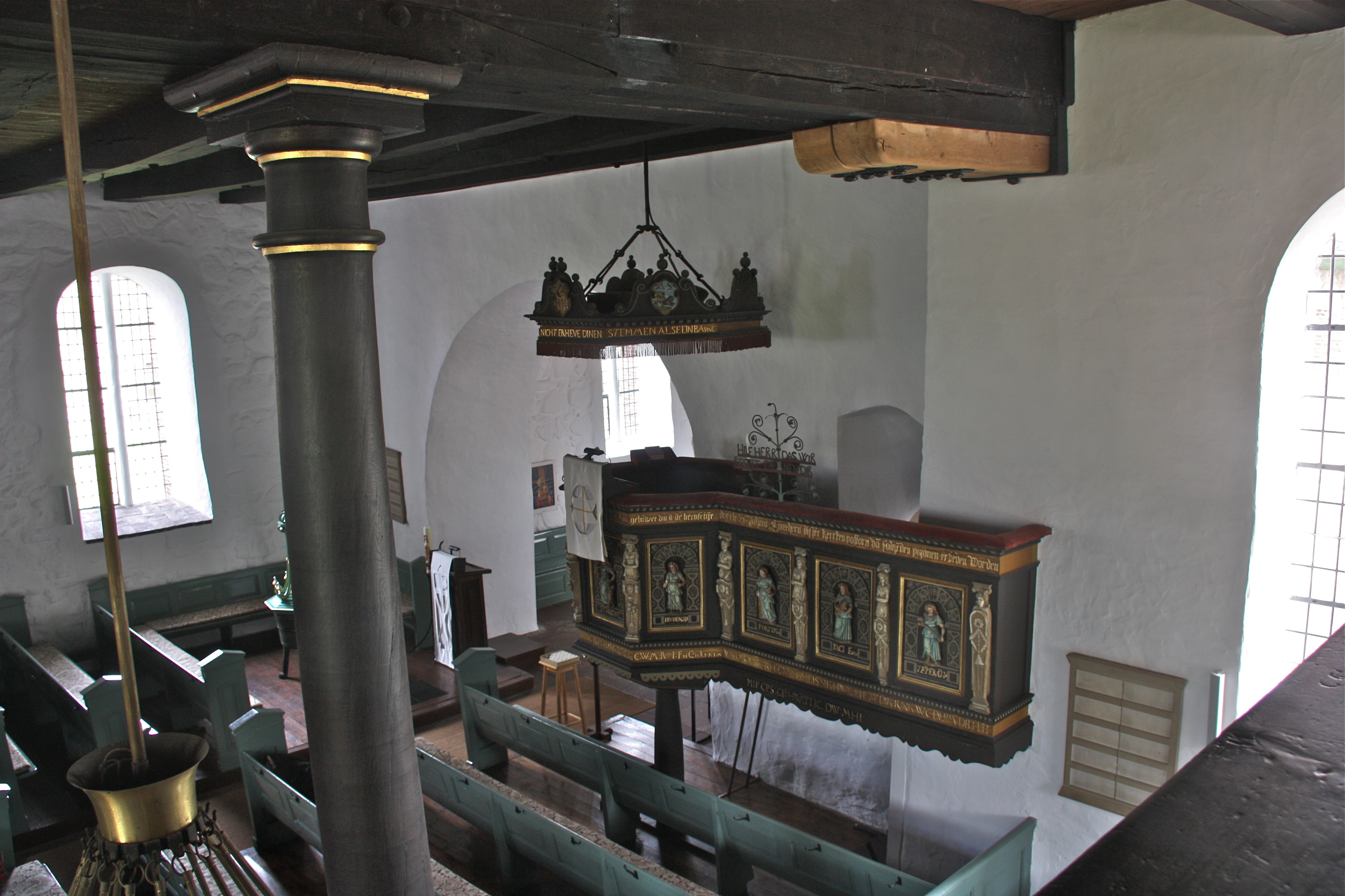 Dithmarschen, Tellingstedt, Kirche St. Martin, Kanzel von oben